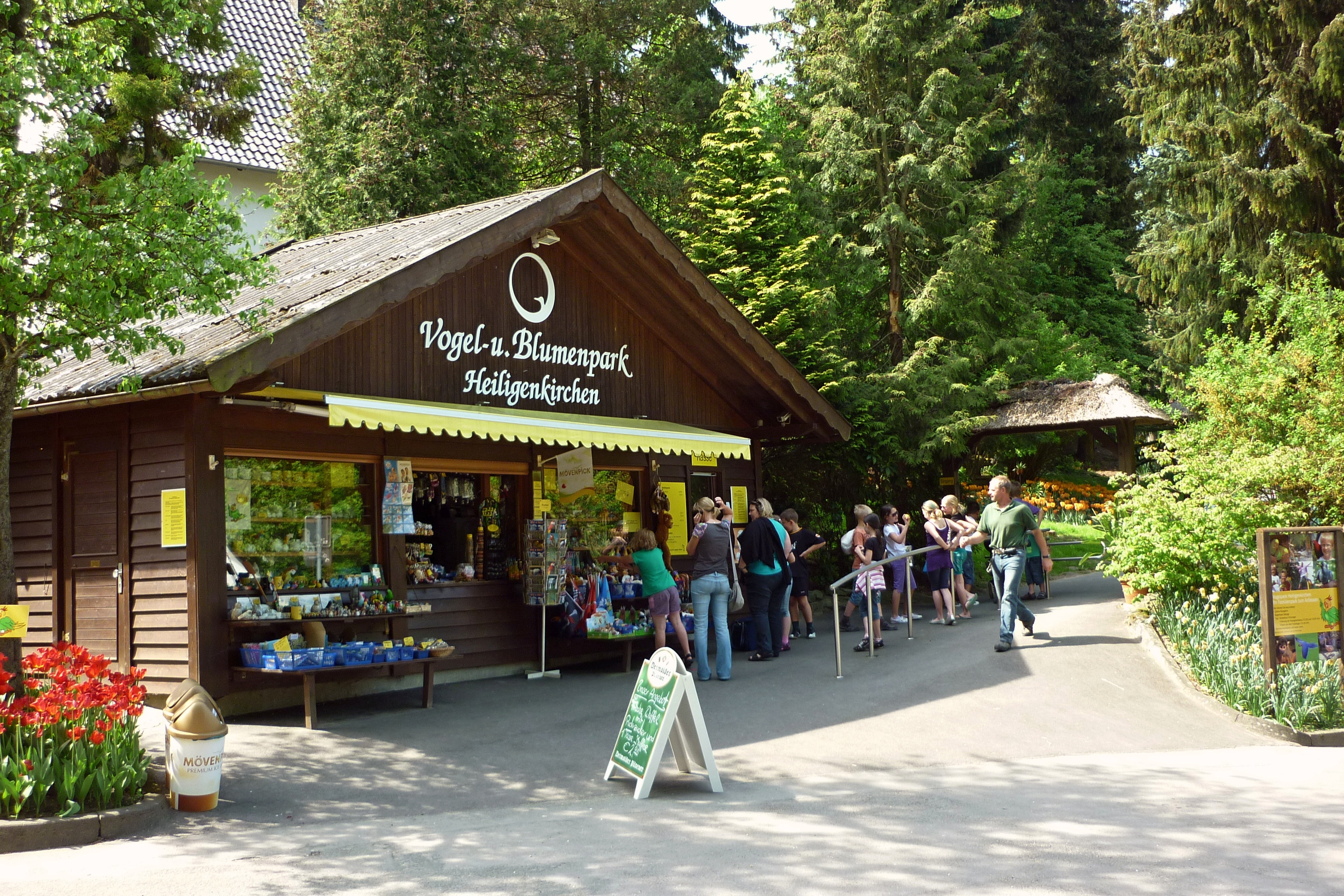 Detmold. Eingang zum Vogel- und Blumenpark in Heiligenkirchen.